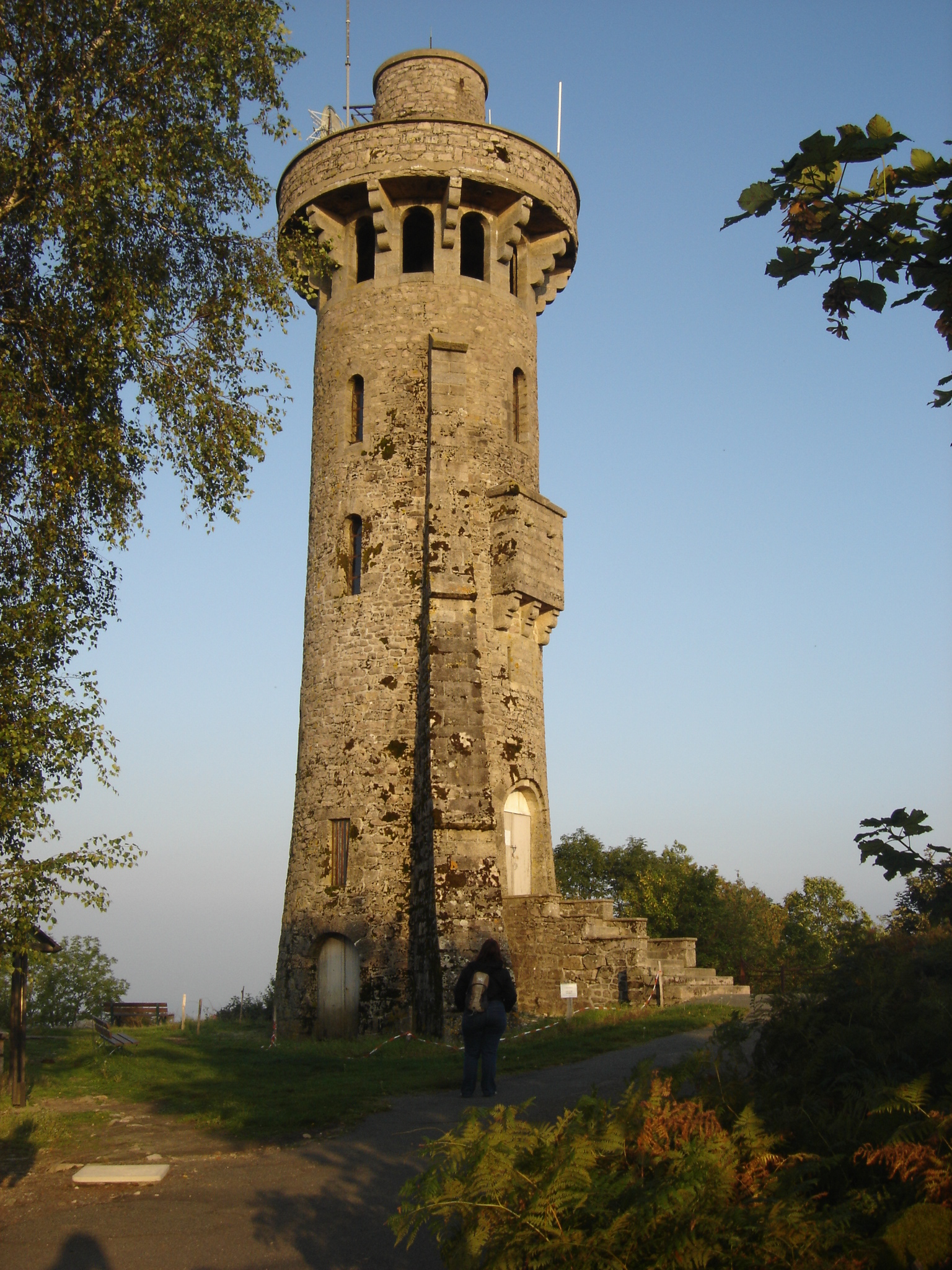 Tour d'observation panoramique de Toulx-Sainte-Croix dans la Creuse (France).